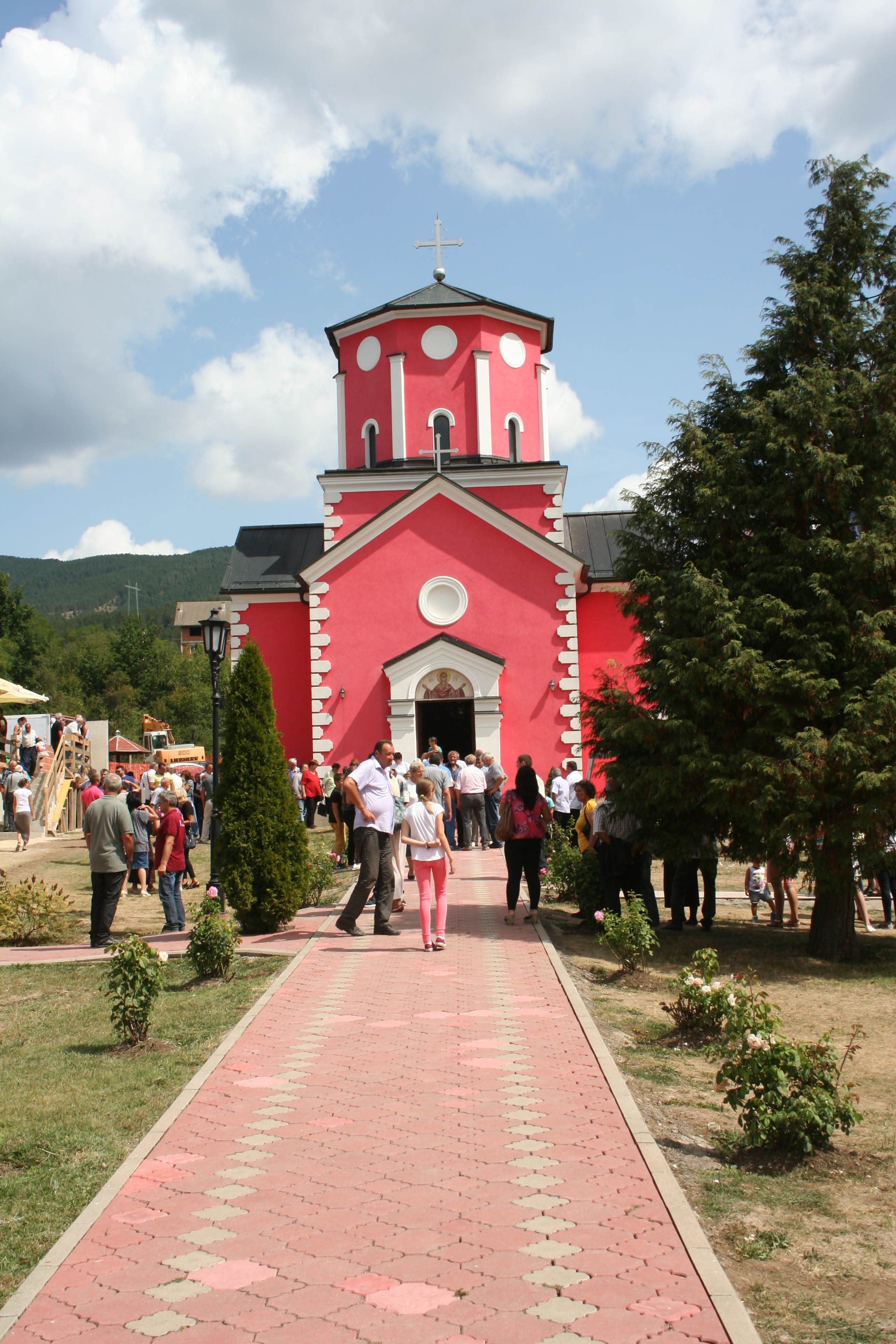 Crkva Uspenja Presvete Bogorodice u Ražani